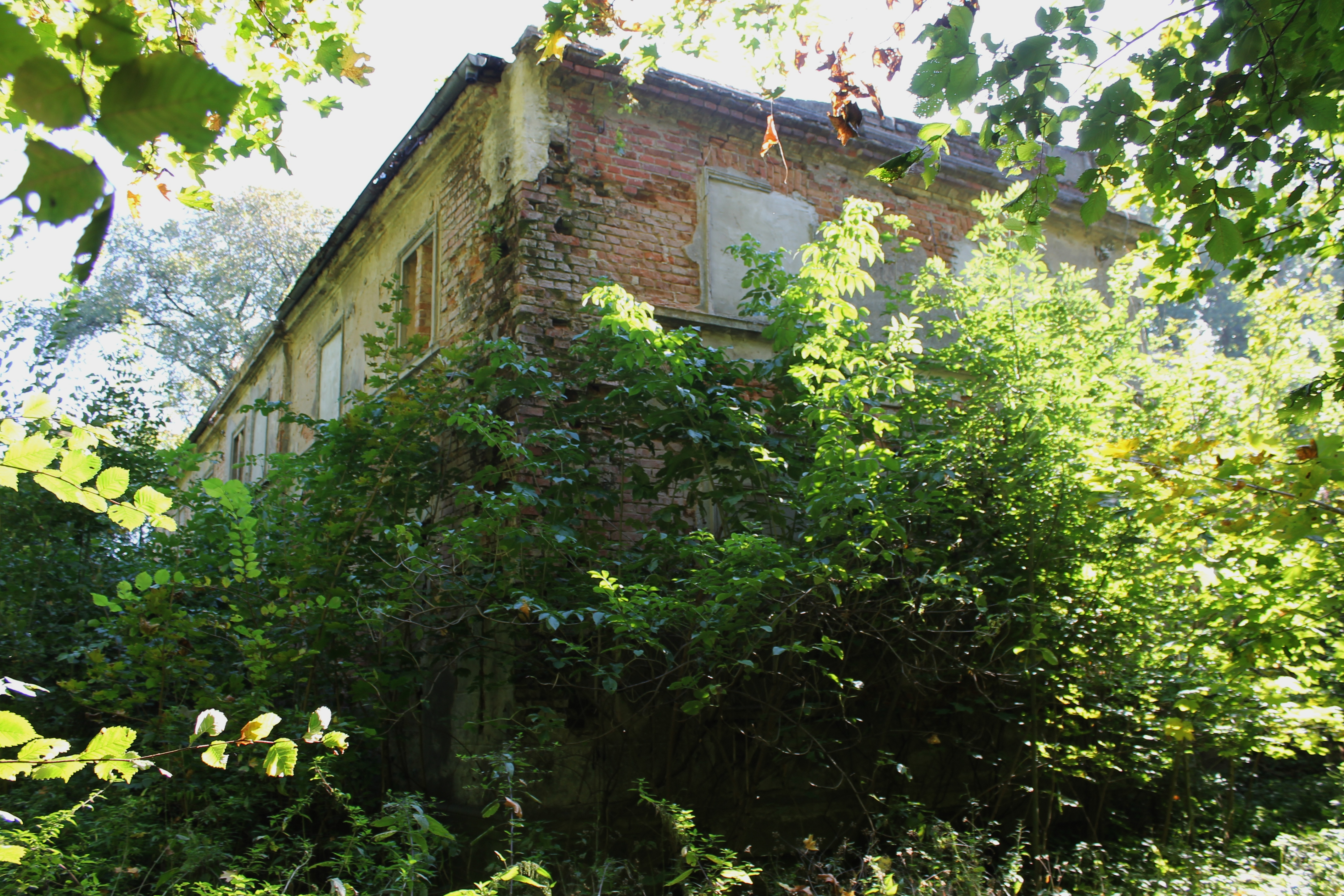 Będzitowo - dwór, 1876, 1911